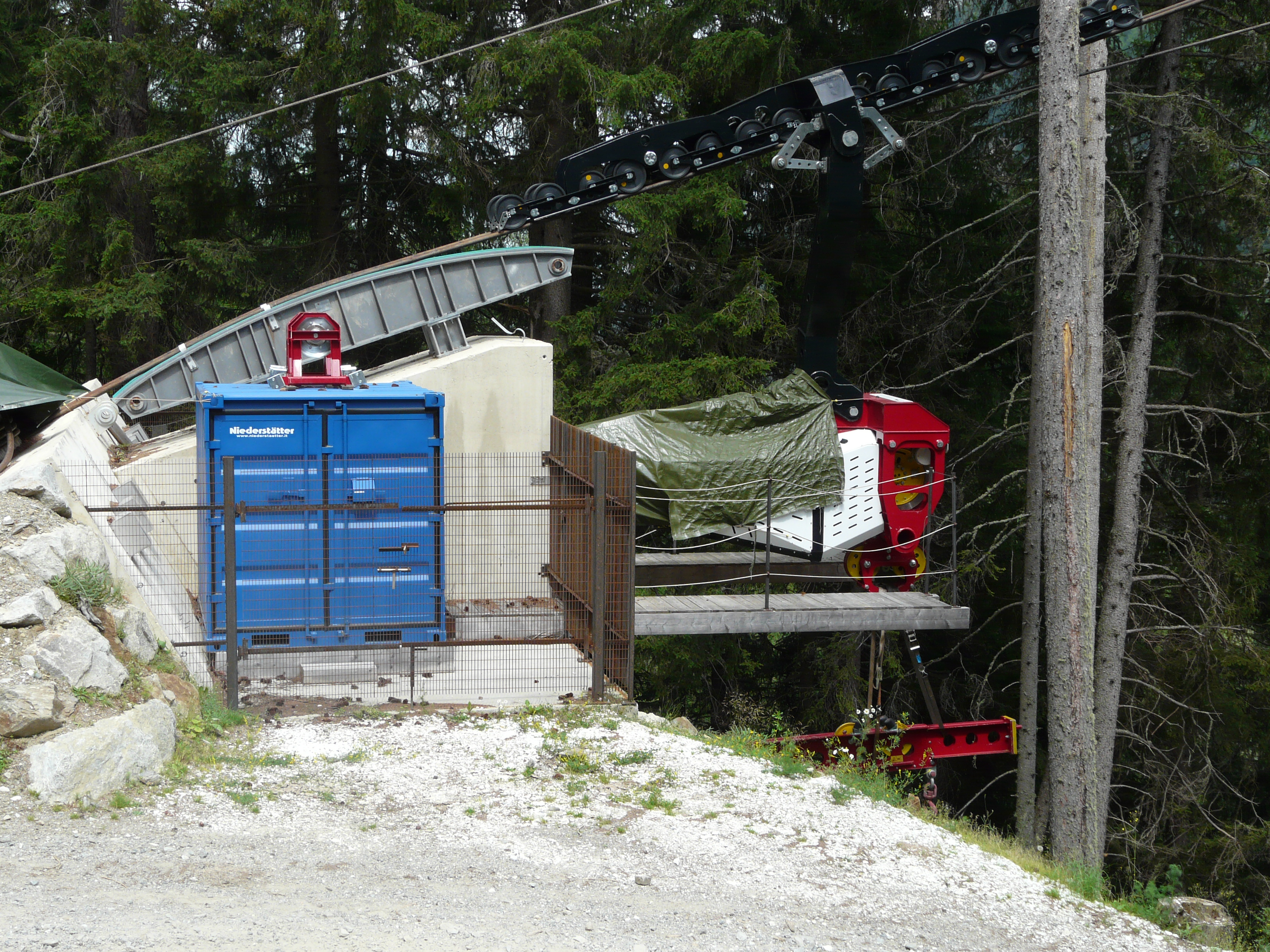 Laas: Seilkran von der Jennwand (Talstation)